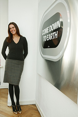 Portrait von Ivana Jeissing, fotografiert von Matti Hillig. Das Bild wurde am 9. März 2007 in Berlin aufgenommen. Ivana Jeissing, geboren 1958 in Salzburg, ist eine österreichische Schriftstellerin. Höhere Auflösungen von diesem und weiteren Fotos sind erhältlich bei